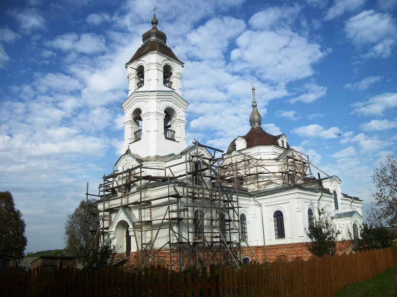 Иоанно-Богословская церковь села Высокораменское шабалинского района кировской области